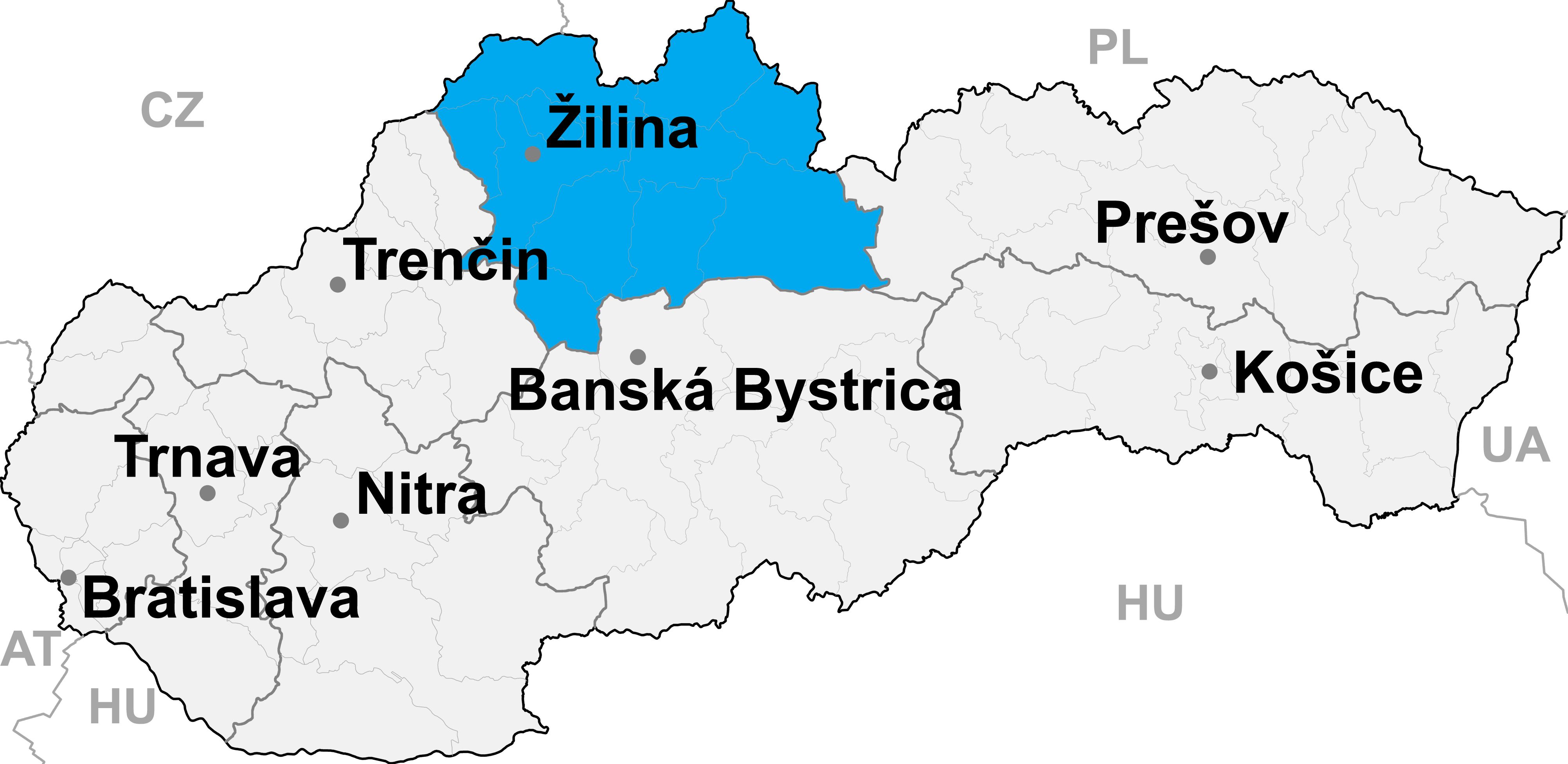 Map of Slovakia, Žilina Region (kraj) highlighted.